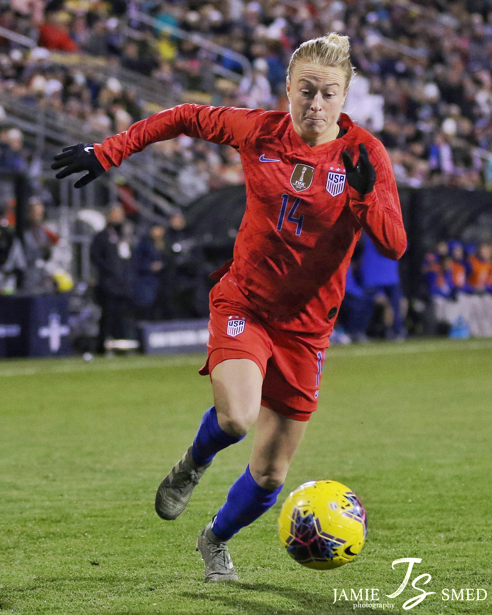 Emily Sonnett